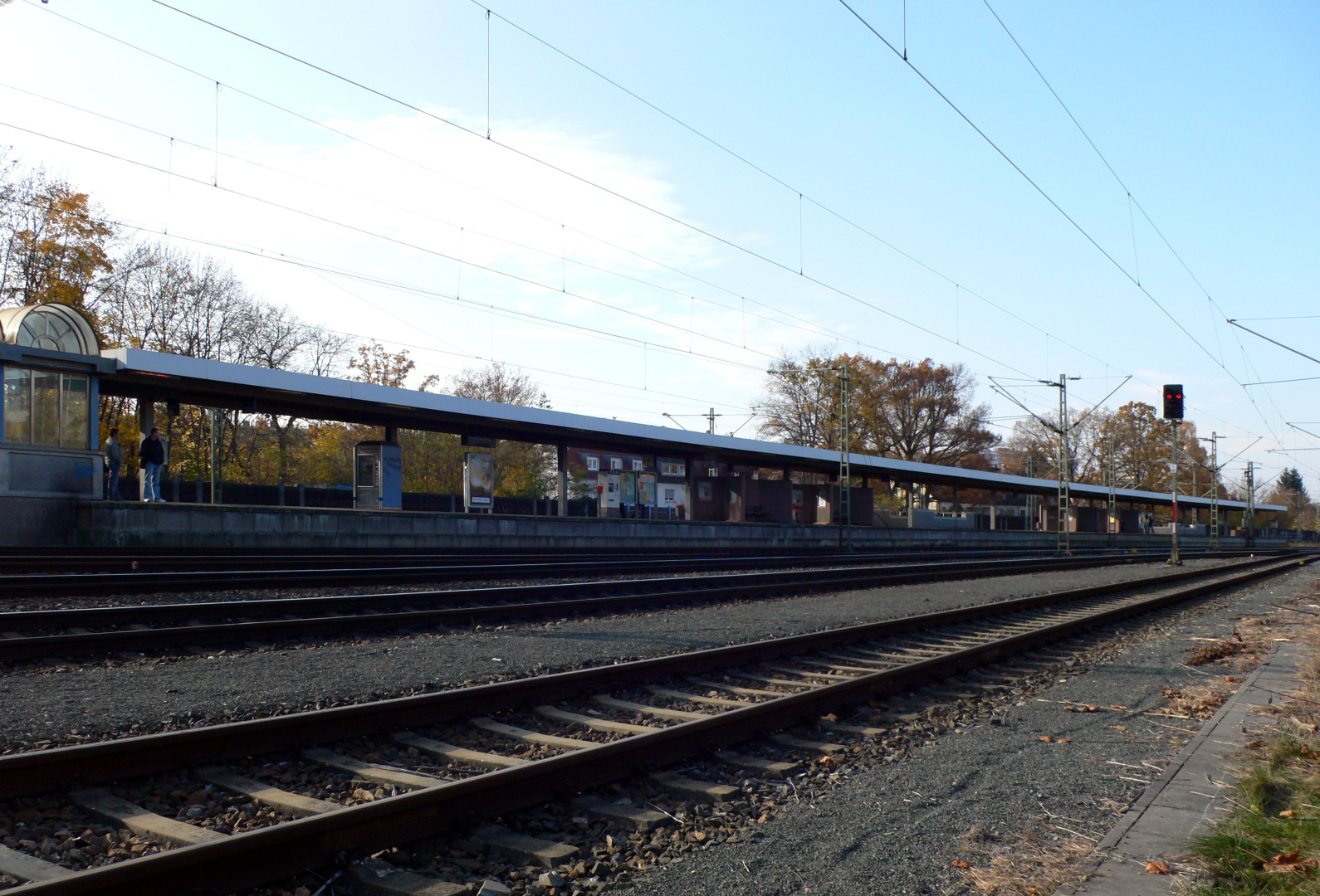 Bahnhof Nürnberg-Dutzendteich, Blick von Osten auf den S-Bahnsteig